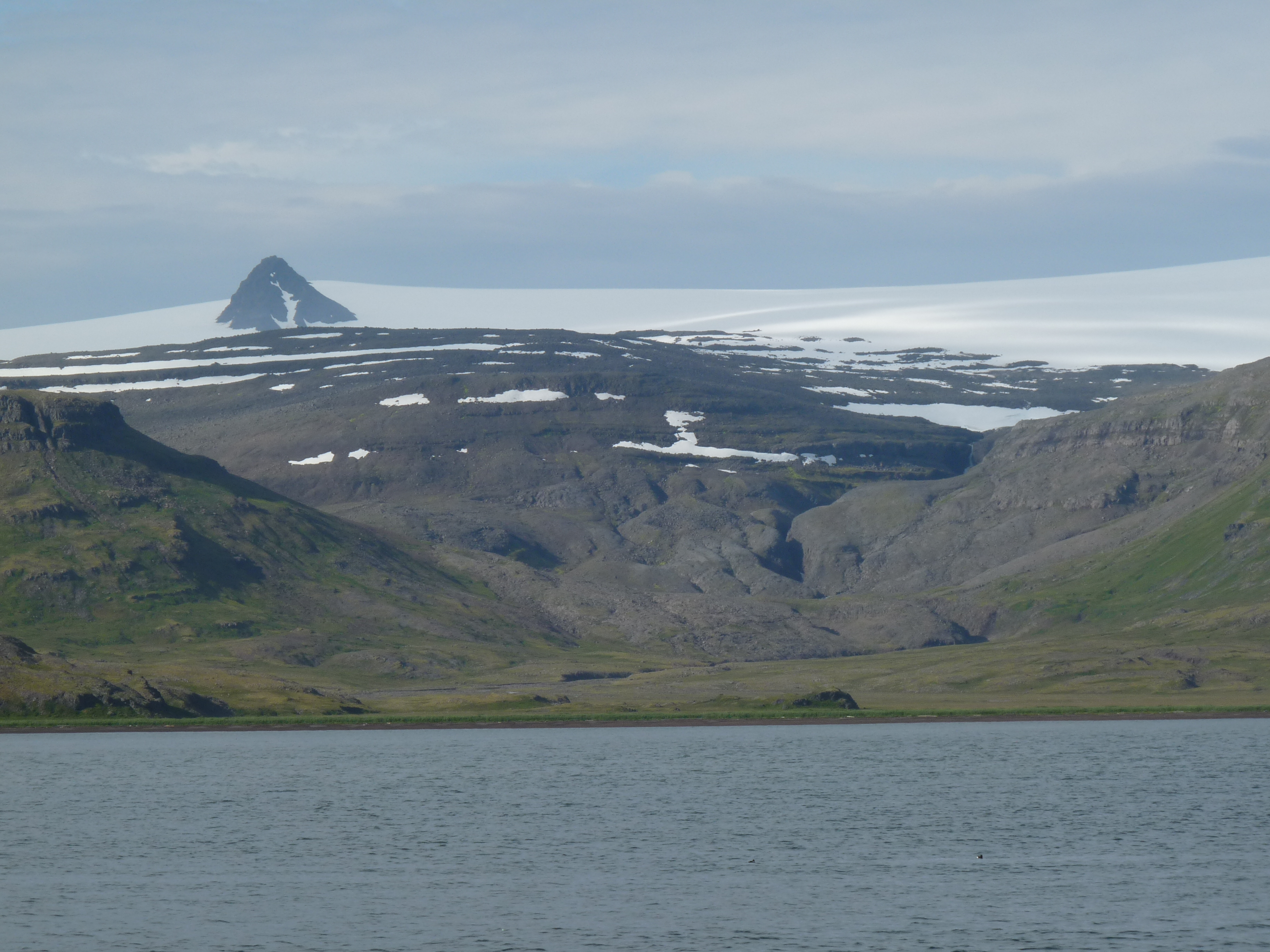 De Þaralátursfjörður baai met de Drangajökull ijskap op de achtergrond